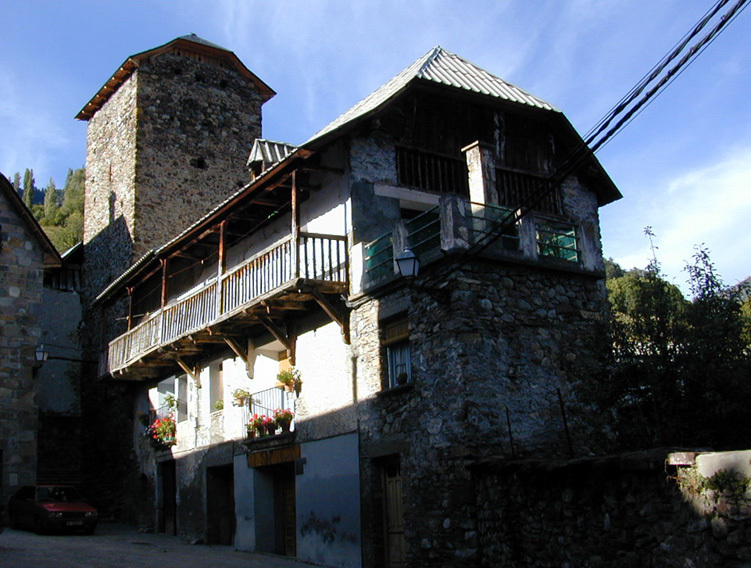 Vivienda con torre defensiva adosada en uno de sus laterales.